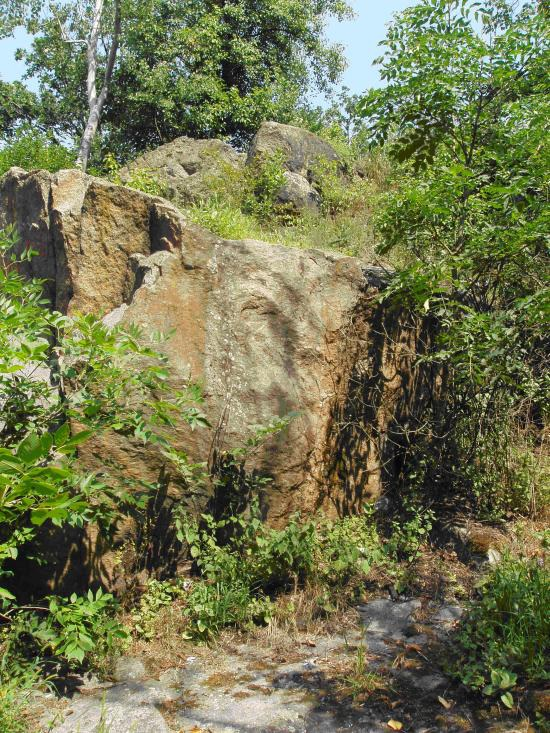 Колишній кар'єр з видобутку каміння (альпійський тип садово-паркового ландшафту). Урочище Голендерня